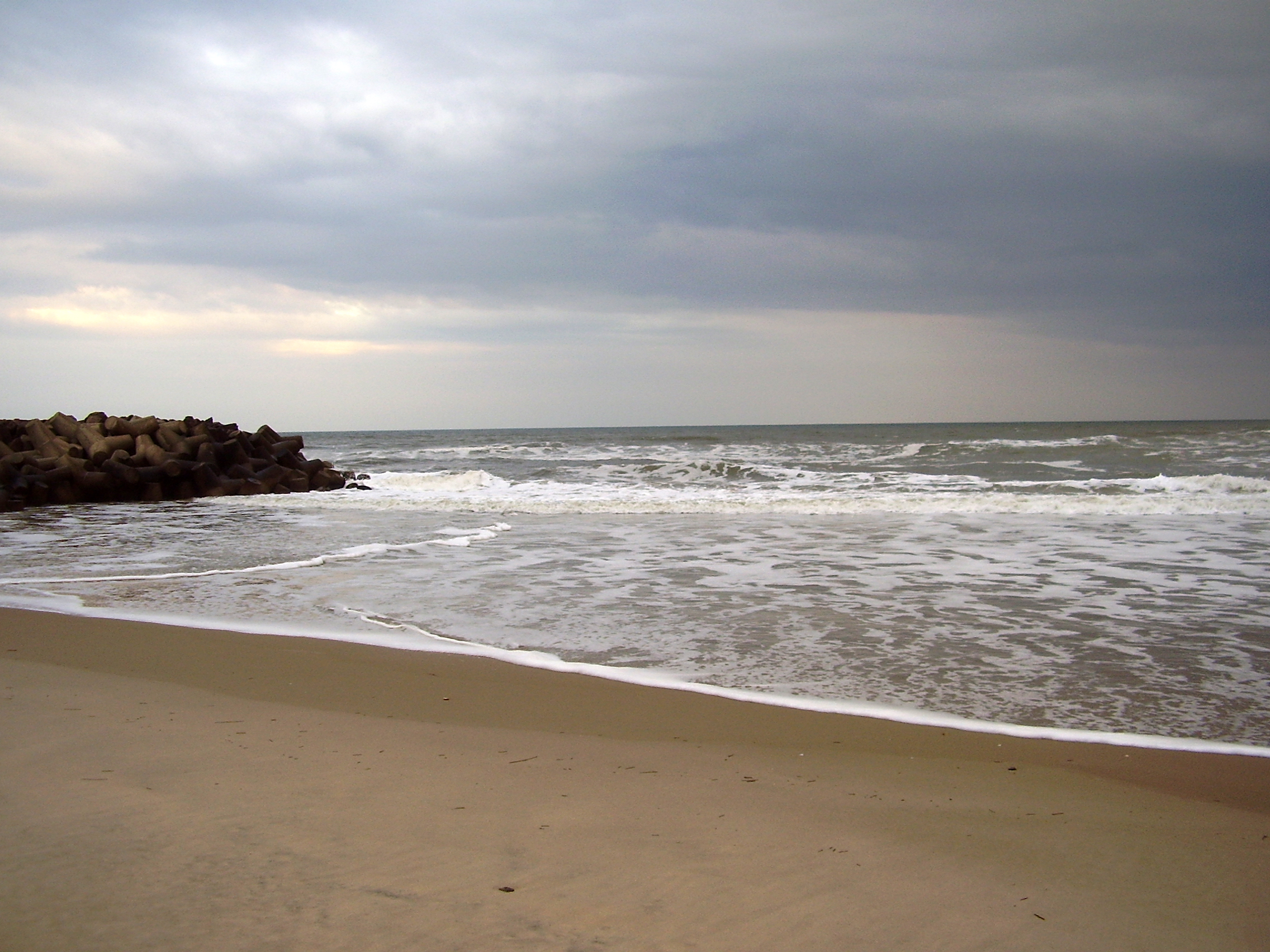 Barra del Chuy Es un tranquilo balneario con reminiscencias de pueblo del interior, extendido por unos cinco kilómetros sobre la costa atlántica y recostado a la desembocadura del arroyo limítrofe con Brasil. Una línea regular de ómnibus cubre durante todo el día los nueve kilómetros de la ciudad de Chuy. Ofrece dos campings con cabañas, y habitaciones en el “Parador de León”. Hay abundante oferta de casas para alquilar durante la temporada. Por la forma en que creció el balneario, se puede decir que ninguna de esas viviendas está a más de 200 metros de la costa. En un par de cuadras se concentran locales de baile, gastronomía y juegos.